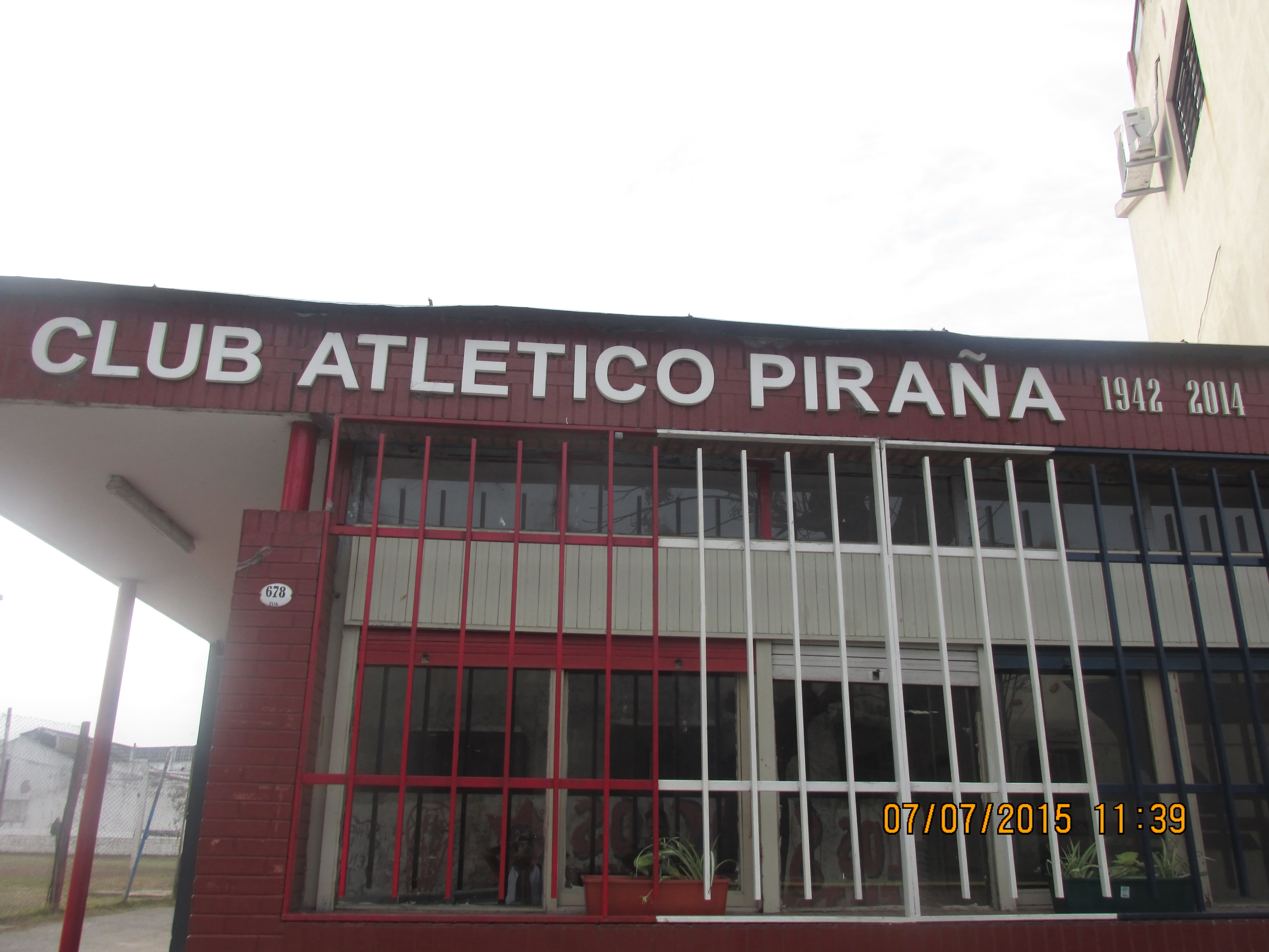 Más del club